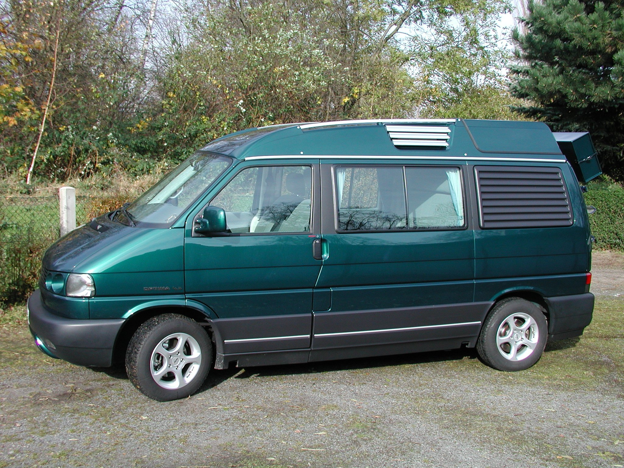 VW Dehler Typ2 T4 Optima 4.7 Baujahr 06/1988